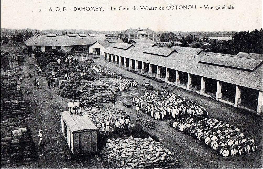 Carte postale - 3 - A.O.F - Dahomey. - La cour du wharf de Cotonou. - Vue générale